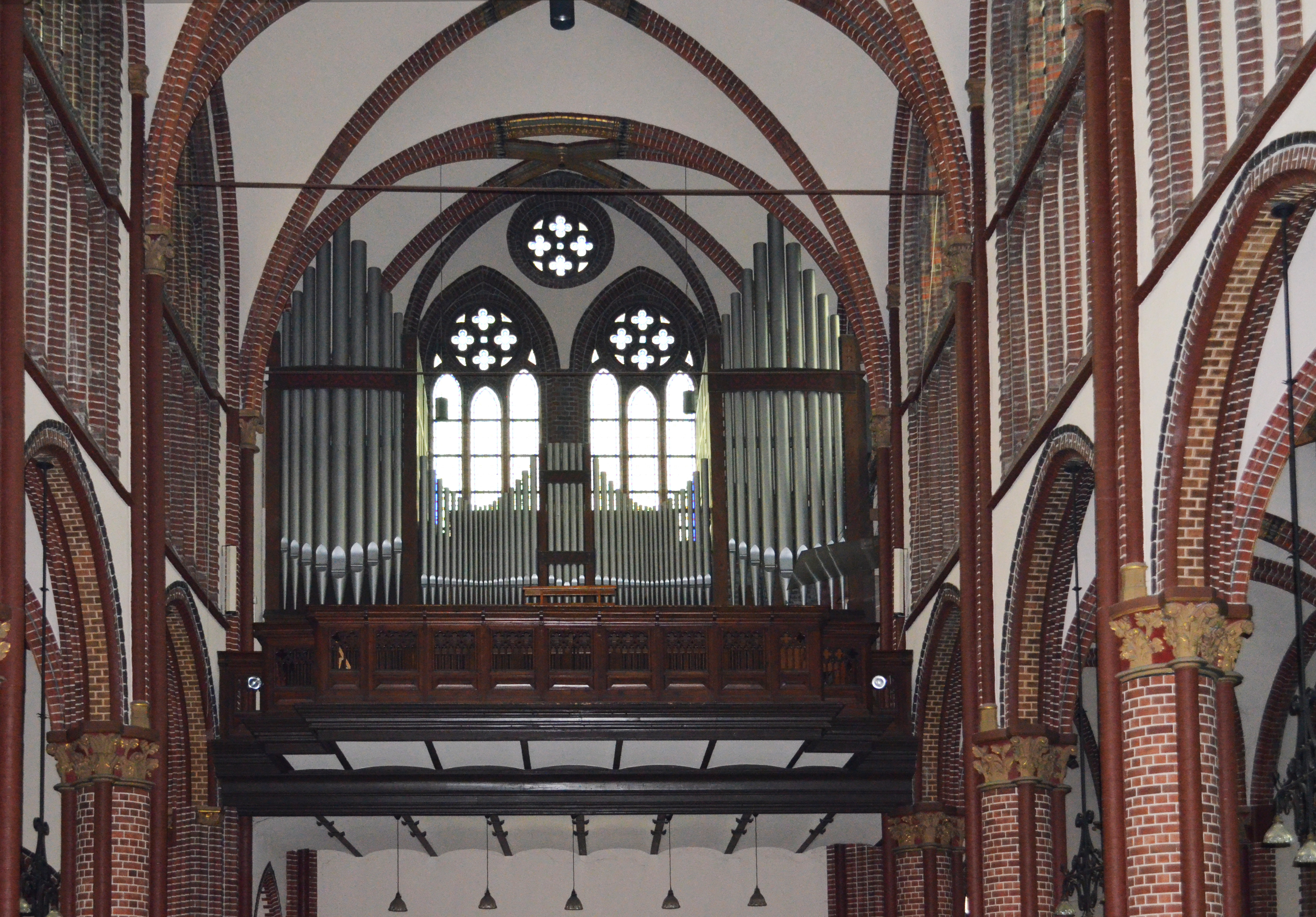 Innenansicht der Sankt-Pauls-Kirche in Vaals, Orgel